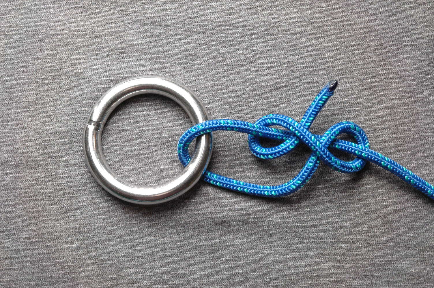 Untightened Buntline hitch (ABOK #1711)